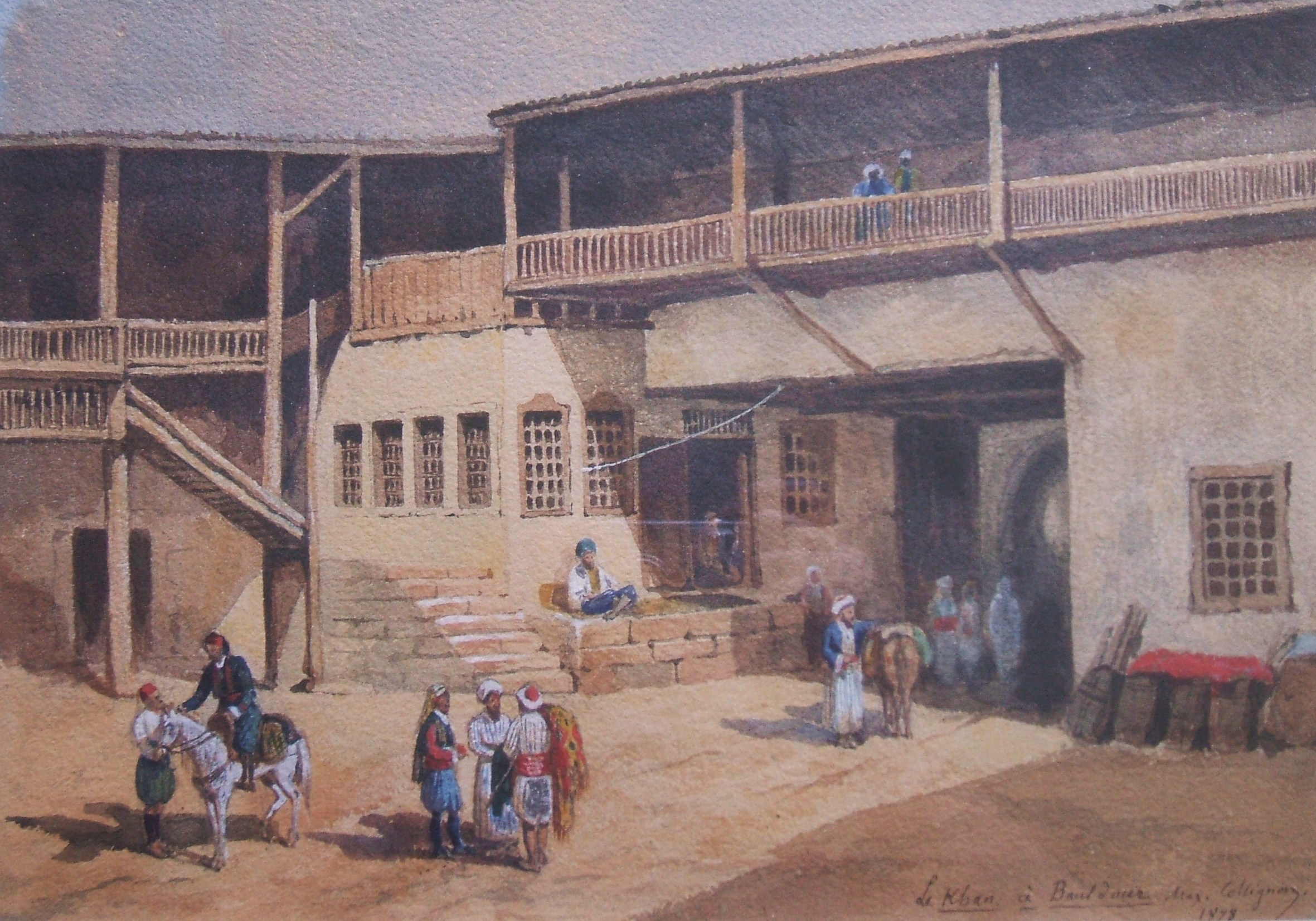 "Le khan à Bouldour" ( ville de Pisidie, en Anatolie, Turquie), dessin de Maxime Collignon (1849-1917), dit Max Collignon, datée de 1878. Aquarelle dans la collection de Marie-Anne Miniac, Rennes, France.